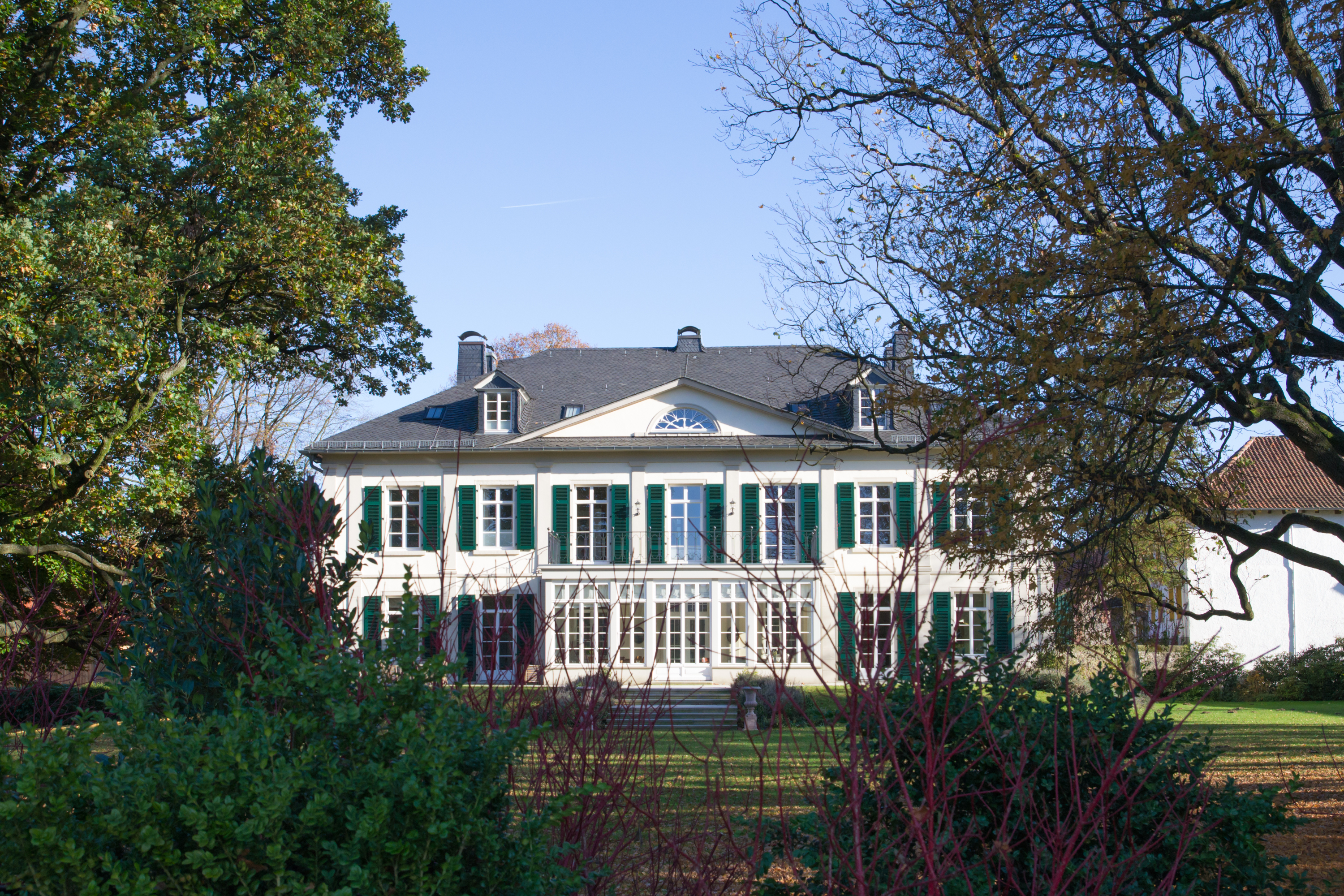 This is a photograph of an architectural monument. Herrenhaus des Ritterguts Hornoldendorf